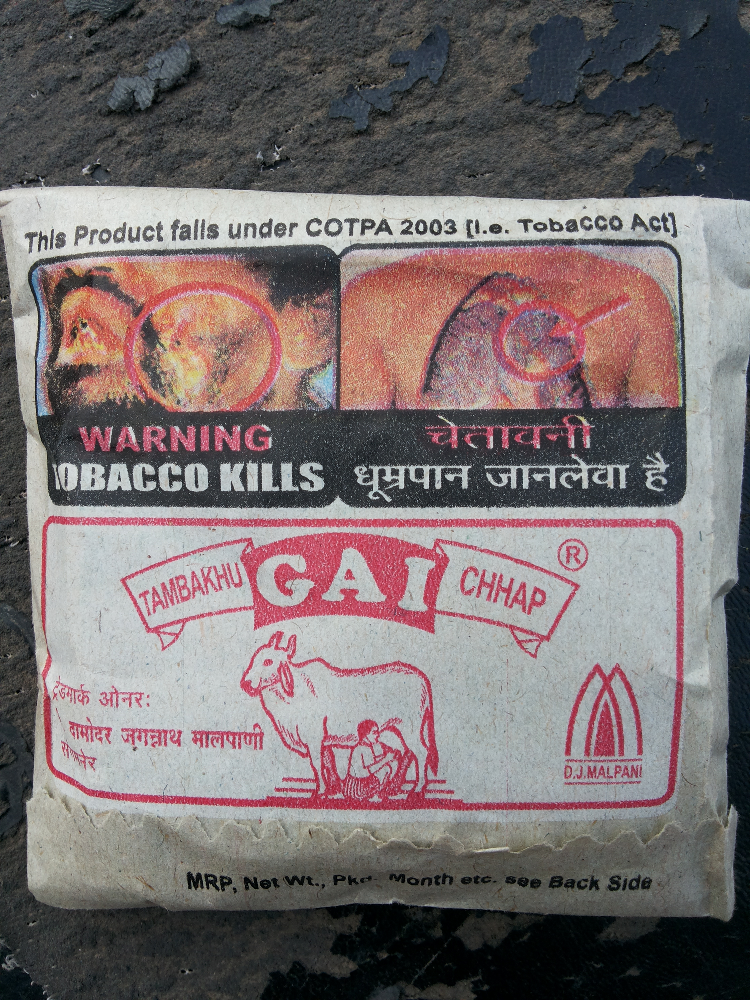 गाय छाप जर्दा पुडीच्या दुसऱ्या बाजूचे छायाचित्र